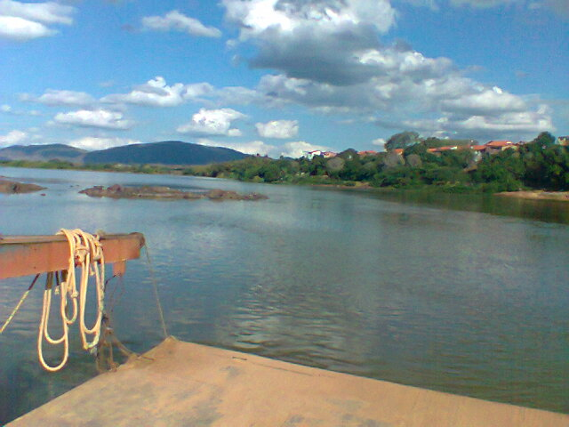 Essa foto foi tirada em uma travessia de balsa na cidade de Jacinto - MG do Rio Jequitinhonha